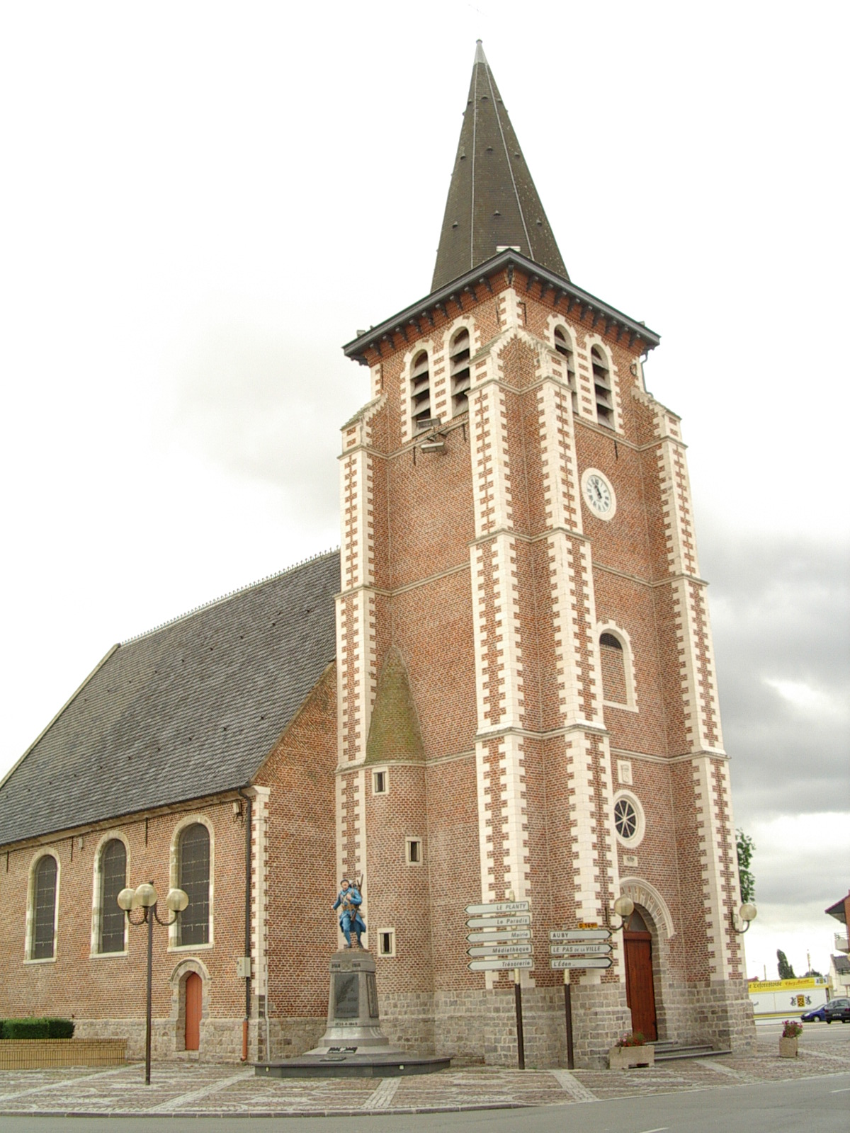 Eglise Saint Nicolas Leforest